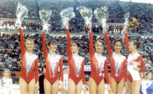 Conjunto español júnior con la plata en el podio del Campeonato Europeo Júnior de Gimnasia Rítmica de Atenas en 1987. El equipo estaba integrado por Alejandra Bolaños, Eva Martín, Carmen Martínez, Arancha Marty, Mari Carmen Moreno, Raquel Prat, Nuria Rico y Carmen Sánchez.